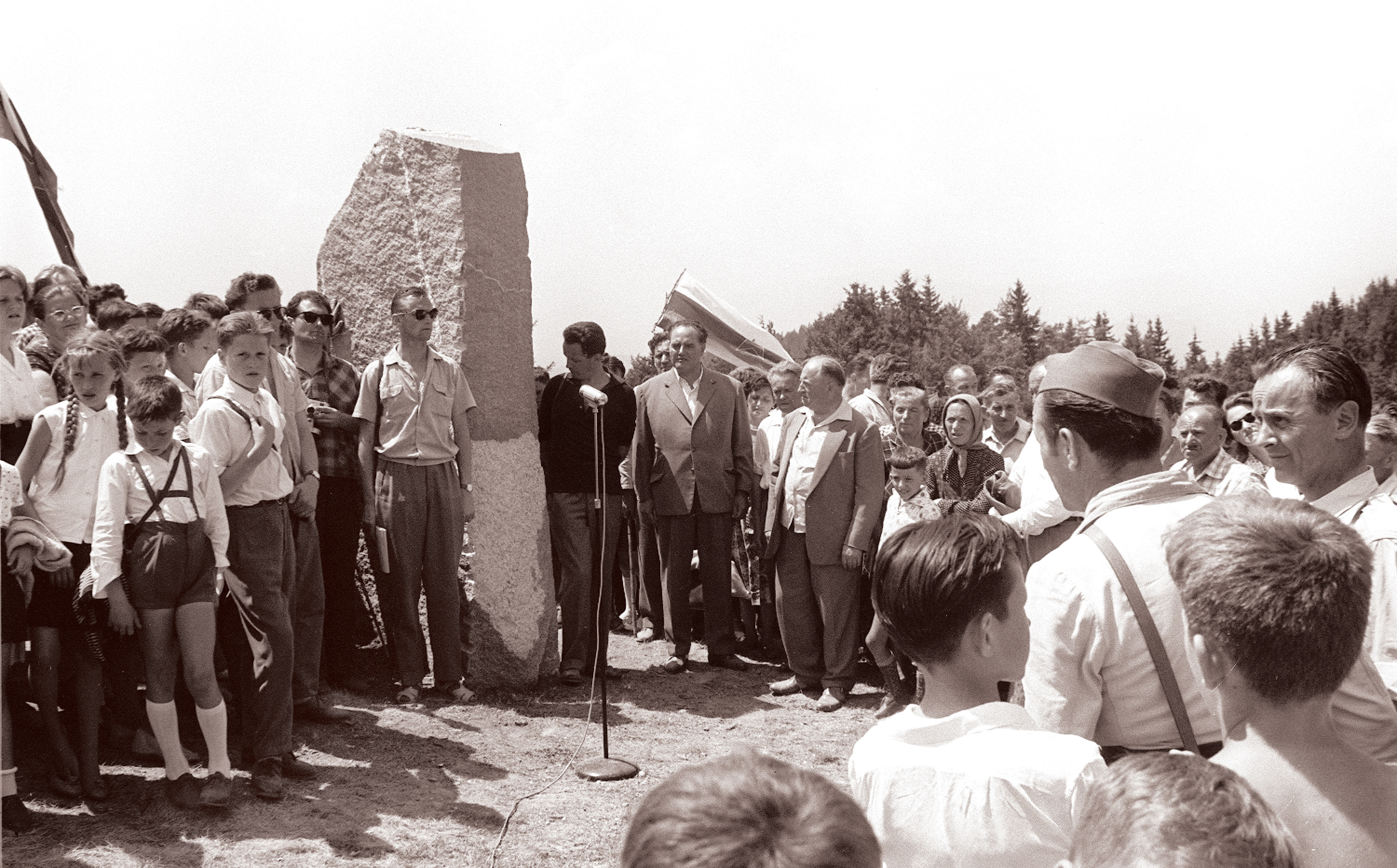 Odkritje spomenika 320 padlim borcem na Graški Gori